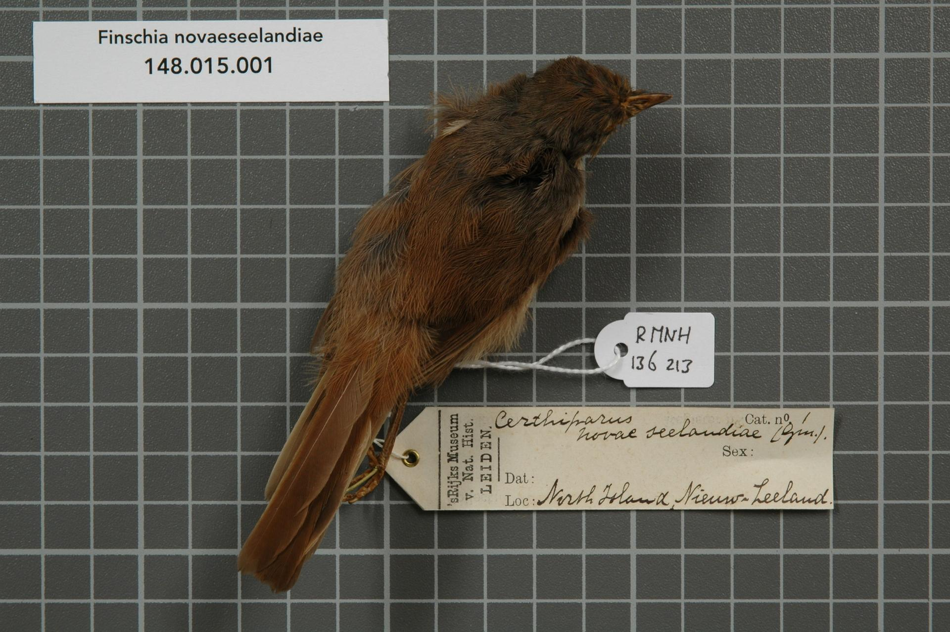 Finschia novaeseelandiae (Gmelin, 1789)